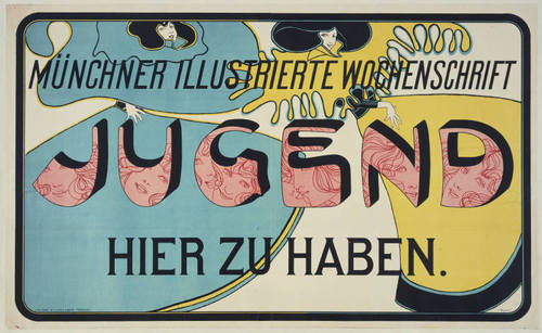 Text: Münchner Illustrierte Wochenschrift Jugend hier zu haben. Jugend (Zeitschrift) MoMA # 251.1987